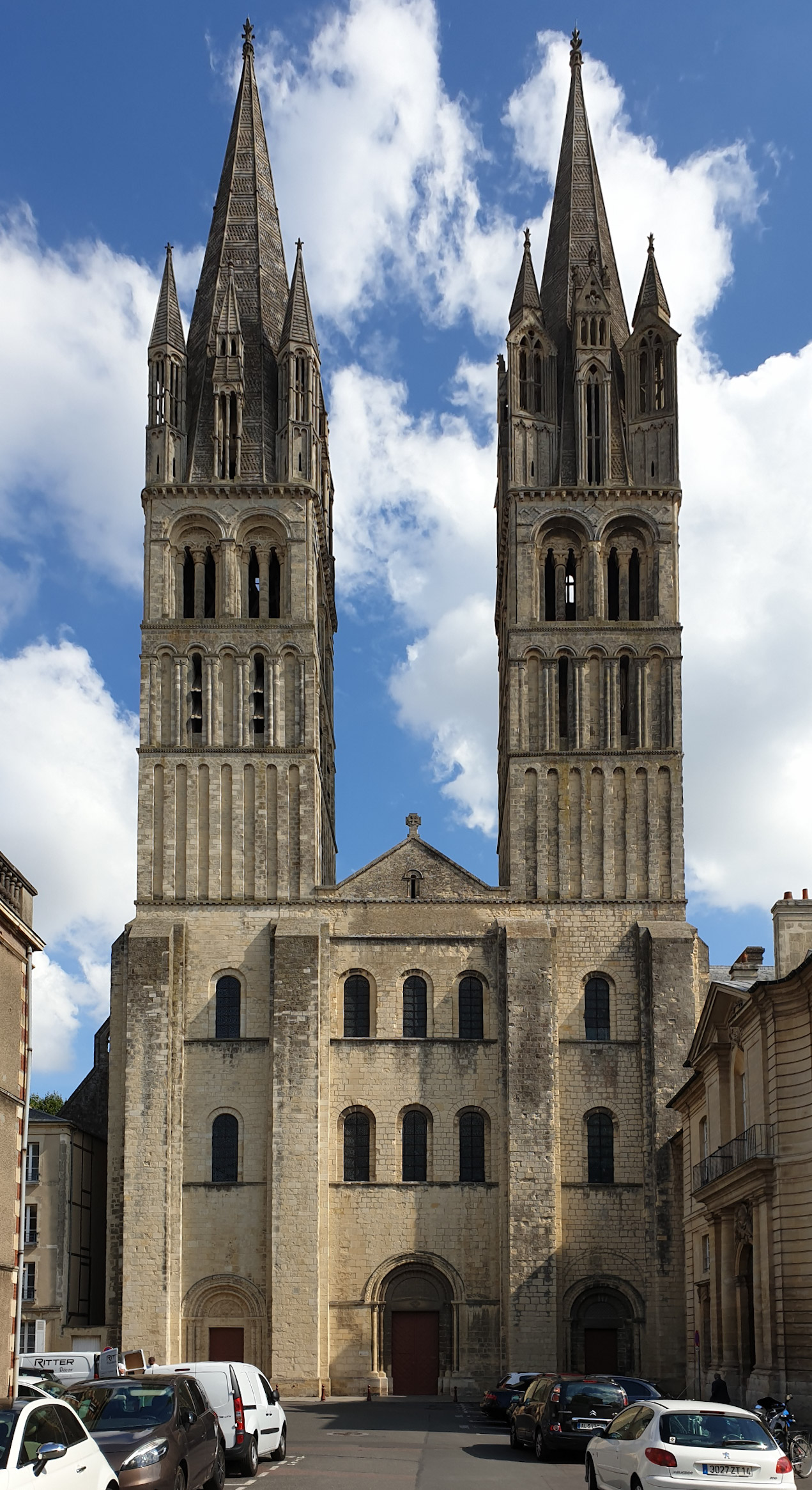 Façade ouest de l'église abbatiale de l'abbaye aux Hommes, à Caen.